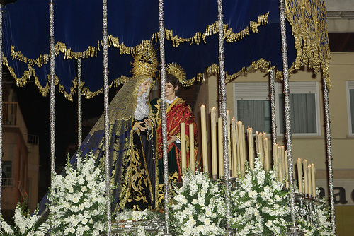 María Santísima Madre de los Desamparados y San Juan Evangelista Fotografía de José Ramón Martínez